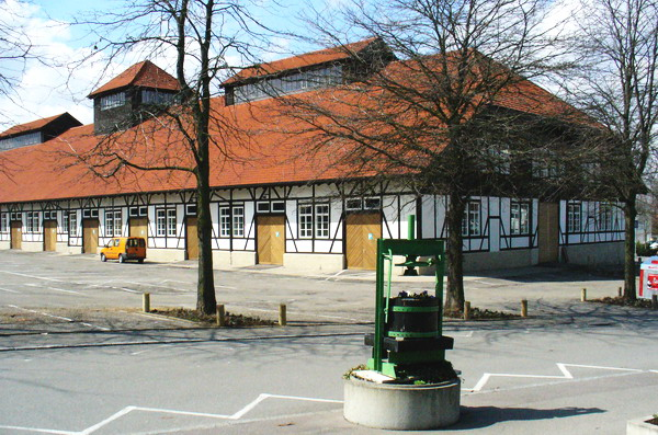 Bildbeschreibung: Fellbach Alte Kelter Quelle: user:Enslin selbstfotografiert in Fellbach, Germany Fotograf/Zeichner: Klaus Enslin Datum: 4. April 2006 Sonstiges: Blick von Süden